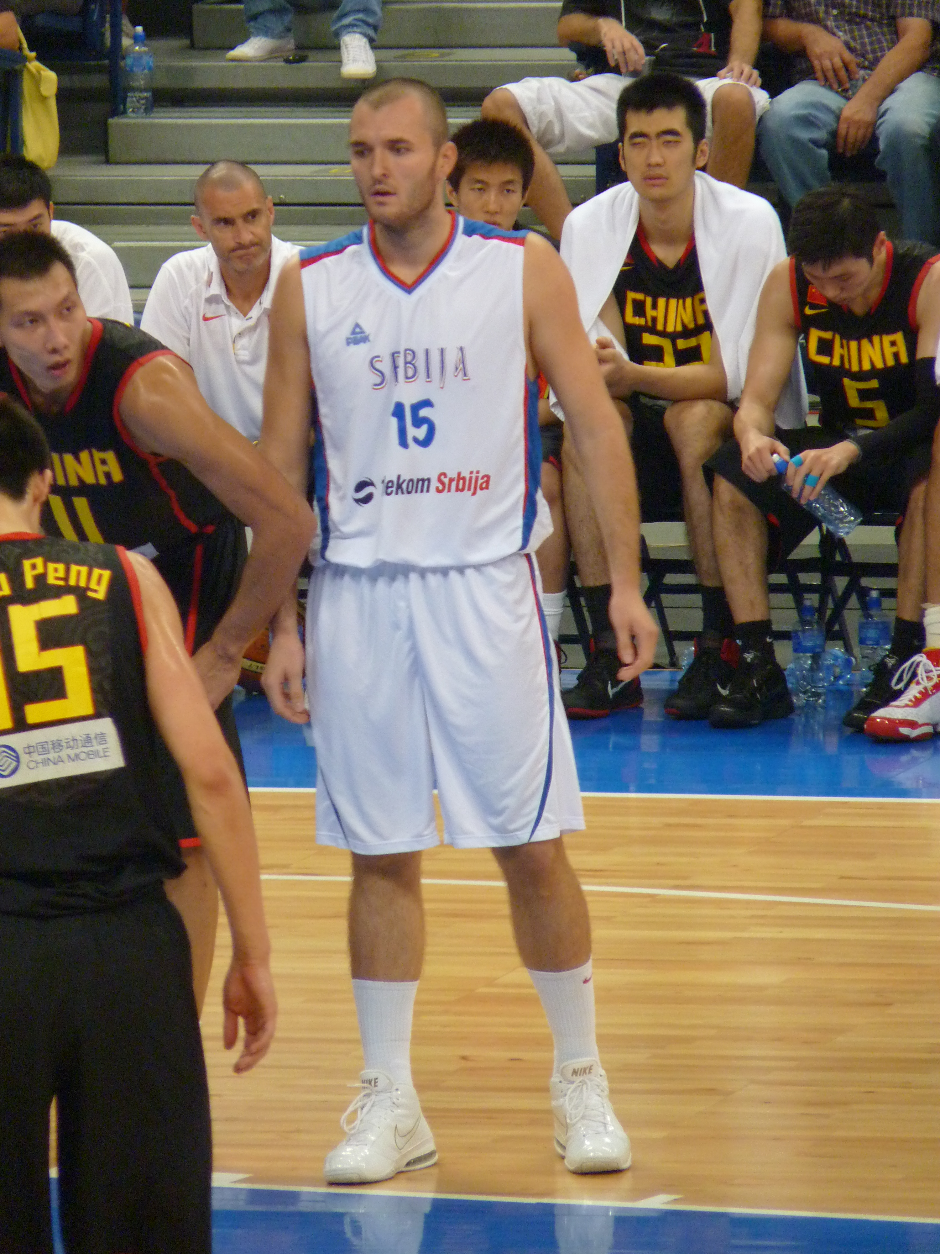 Milan Mačvan